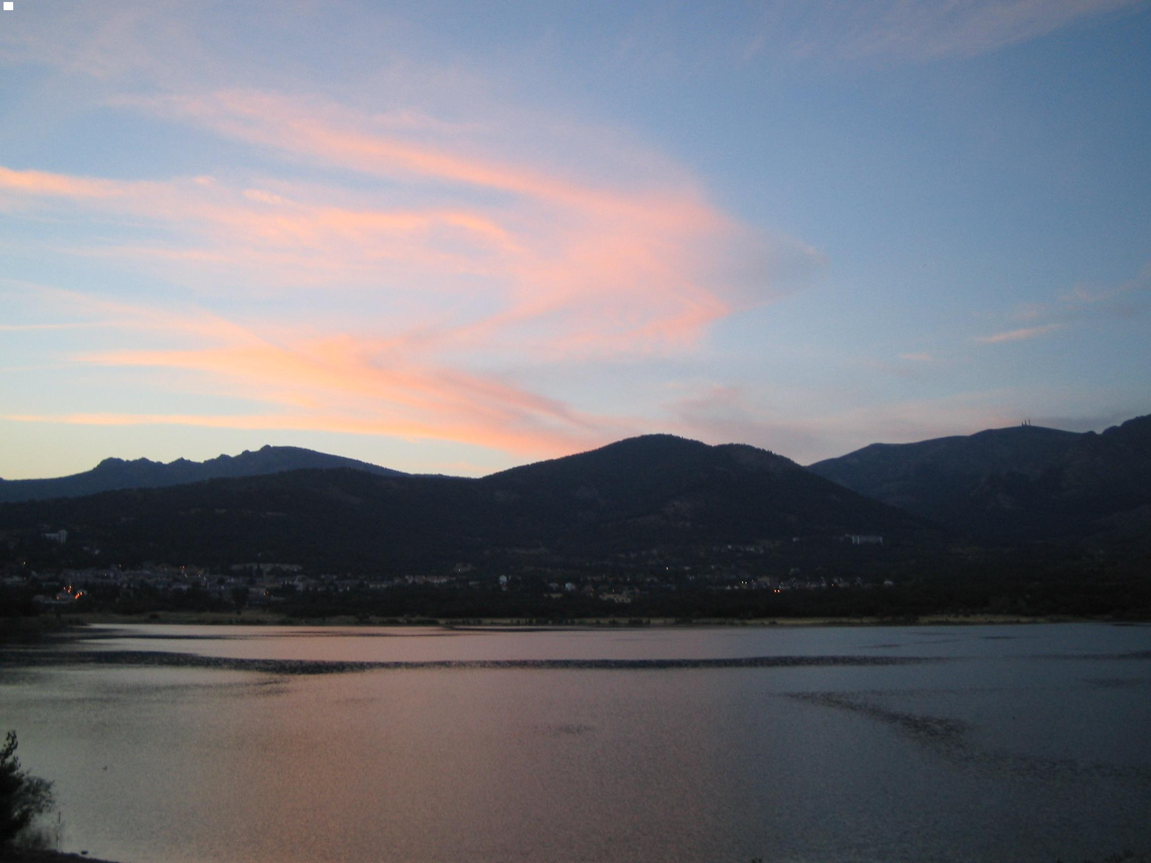 Presa de Navacerrada in Madrid, Spain